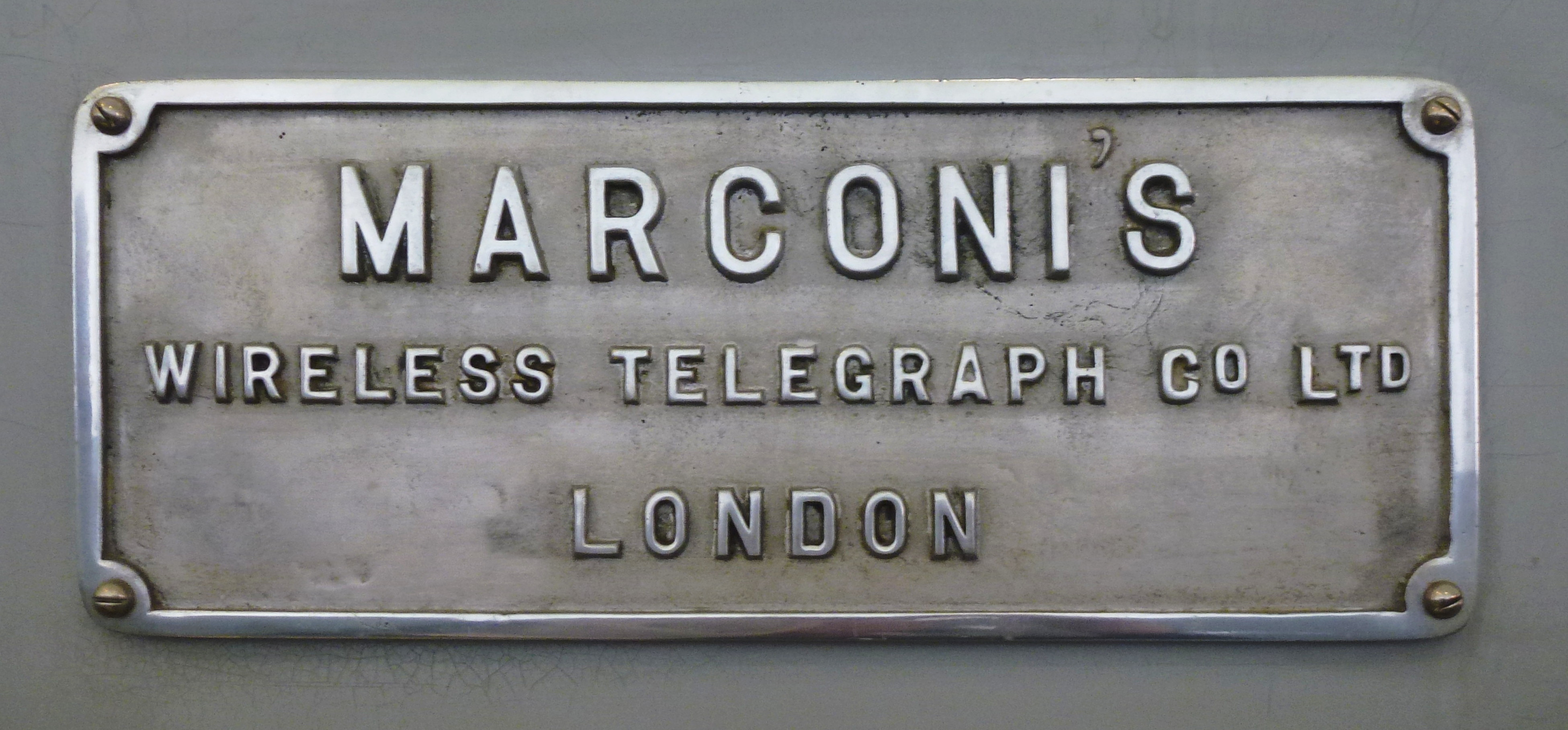 Motala Rundradiomuseum, sändarehallen Motala 150 KW (1935-1961)